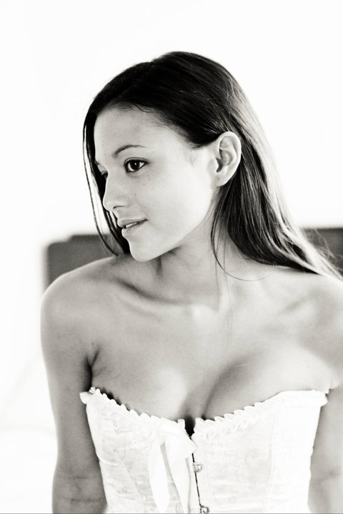 Fotografia efectuada a la actriz Elisa Mouliaá en el rodaje de Memorias de un piano